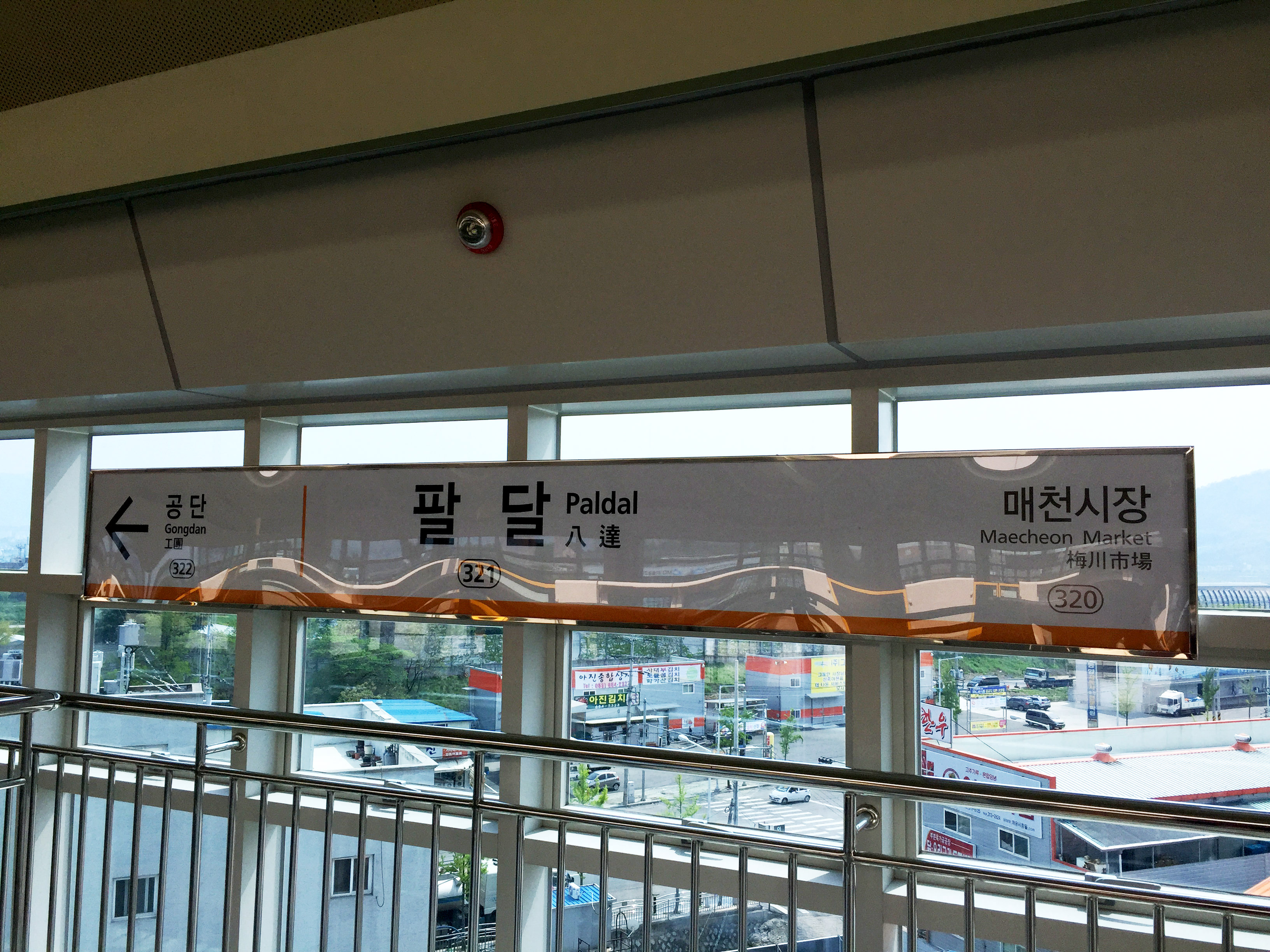 팔달역 역명판